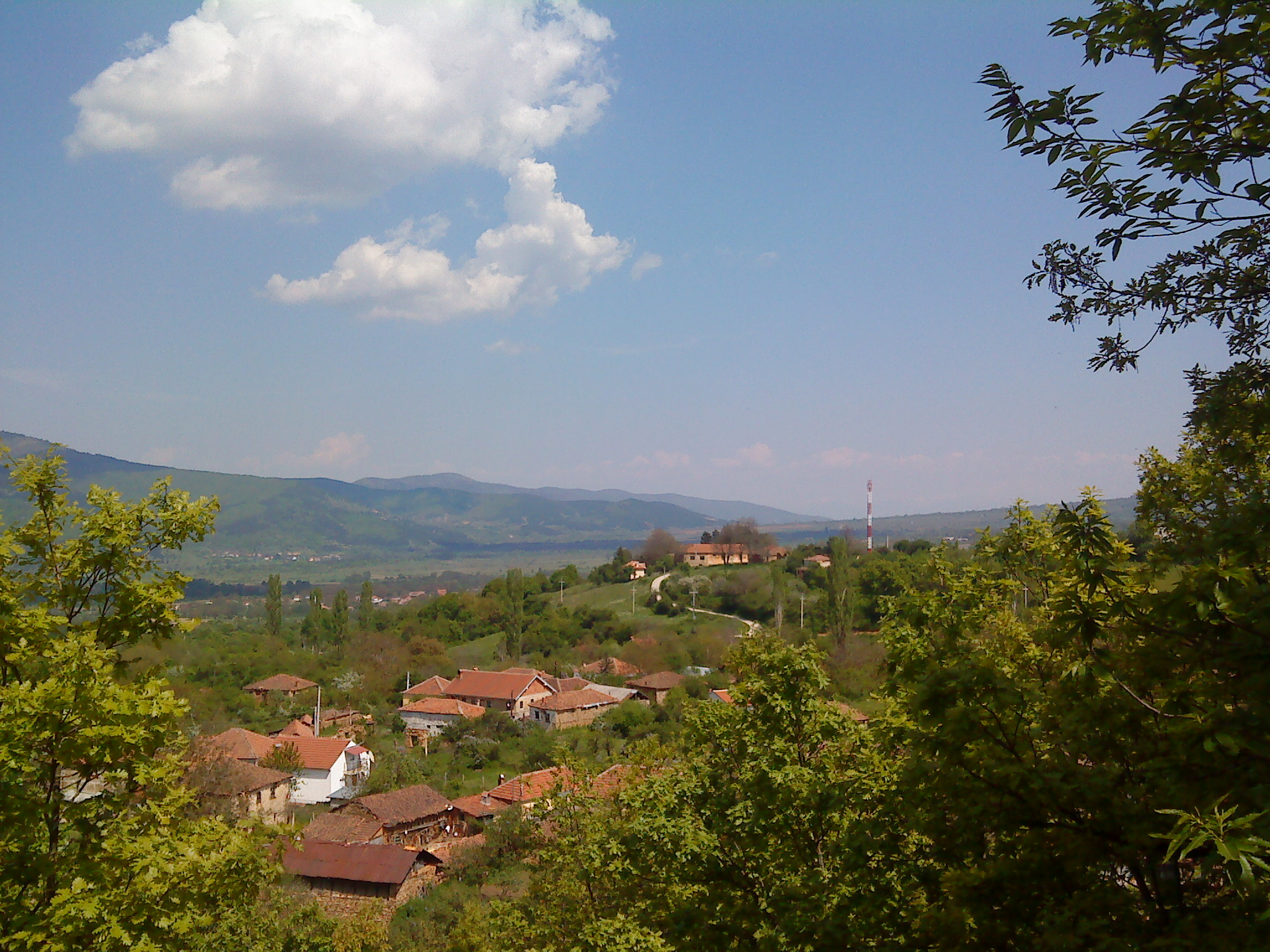 Панорама на с.Ѓавато